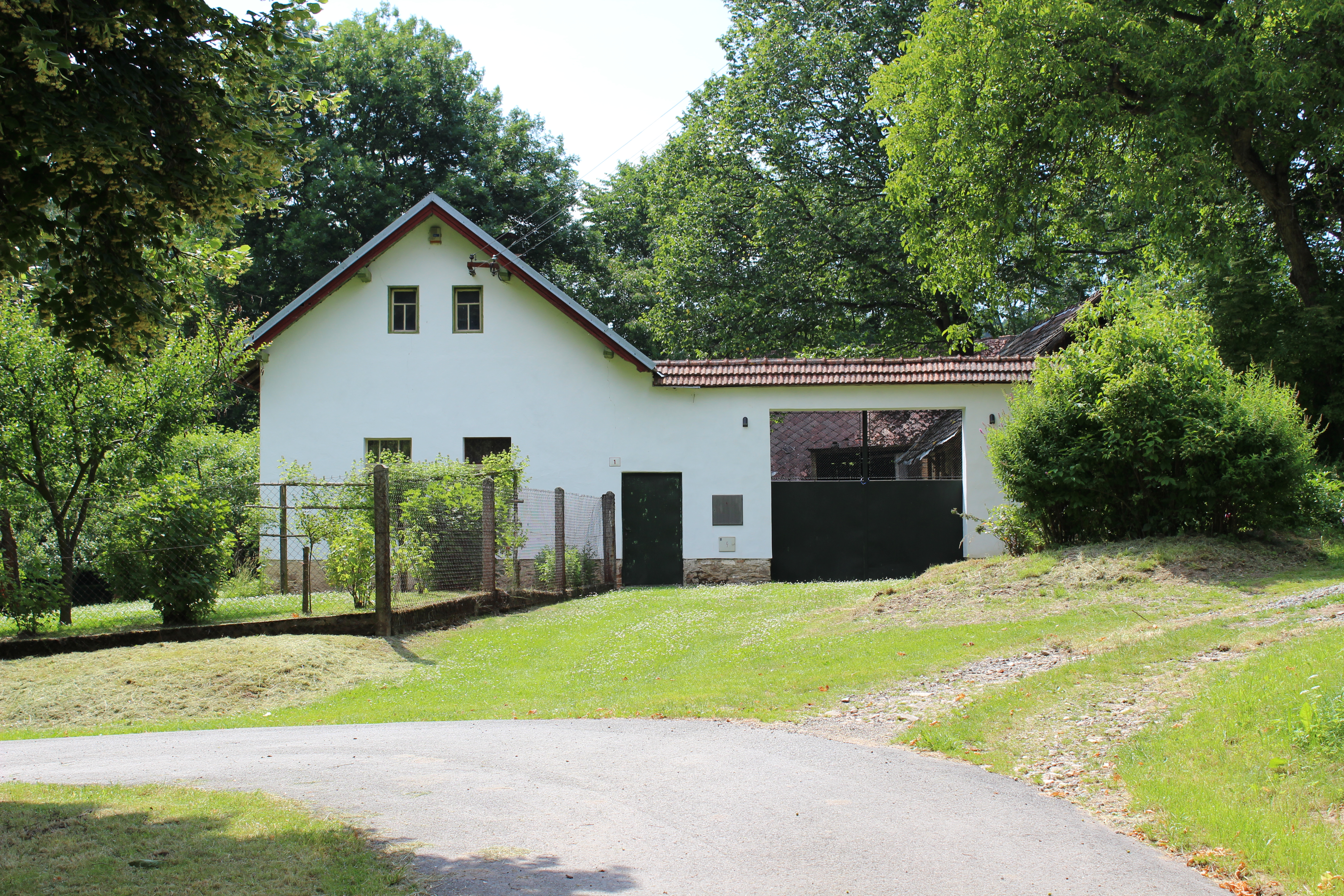 Dům číslo popisné 1 v Sudislavicích.